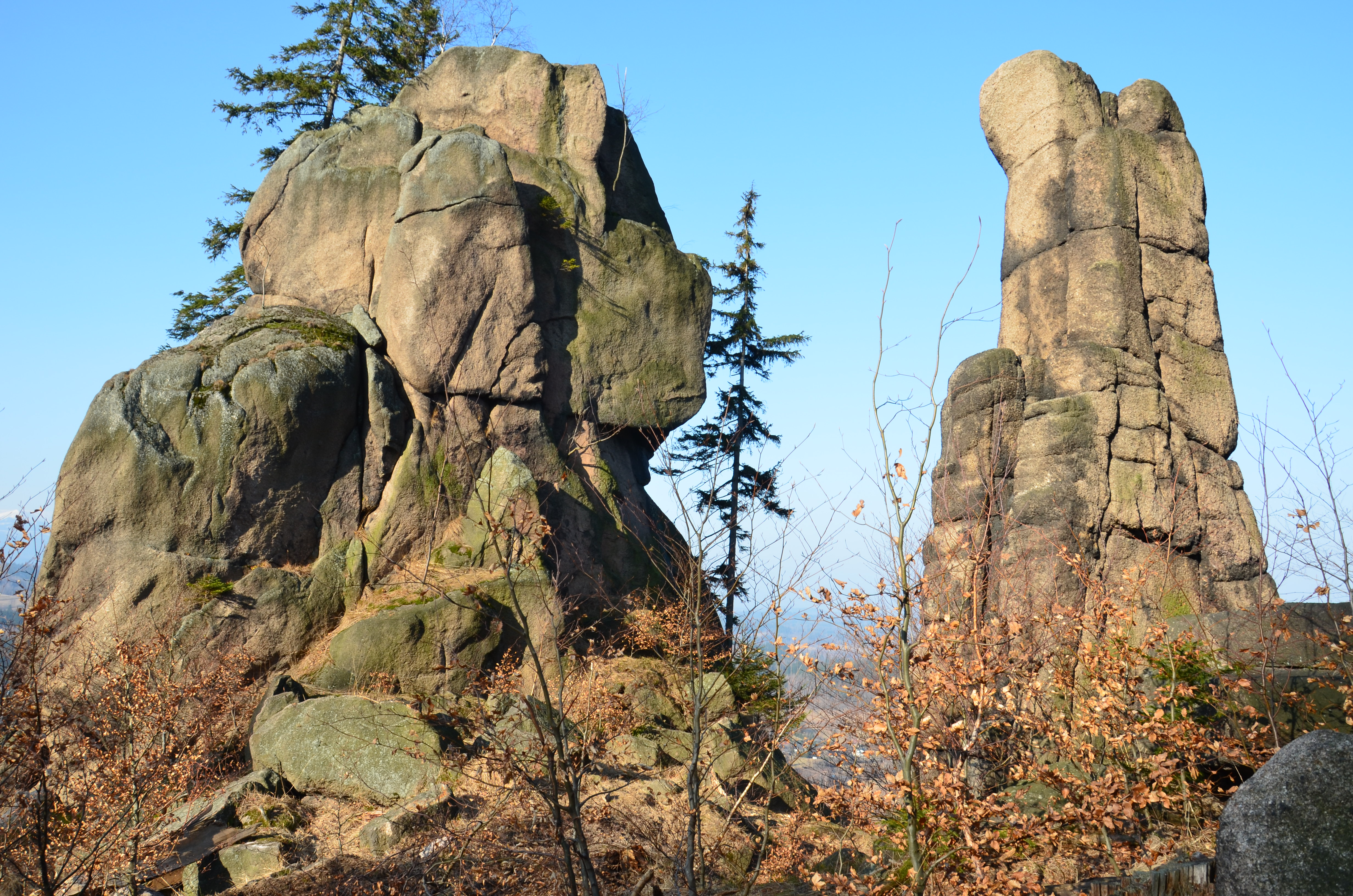 Jastrzębie Skały